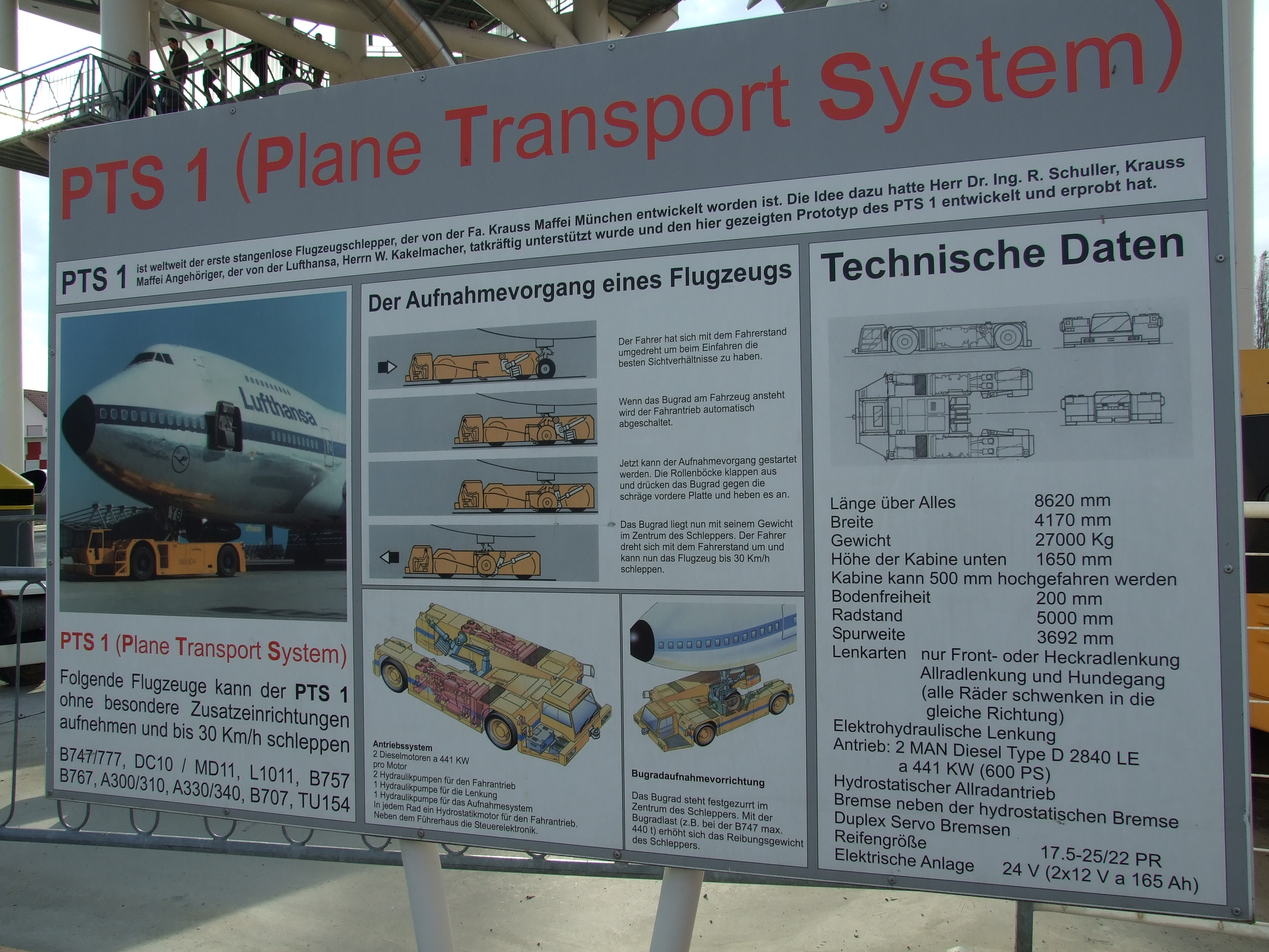 PTS 1 (Plane Transport System) in Technik Museum Speyer (Germany)